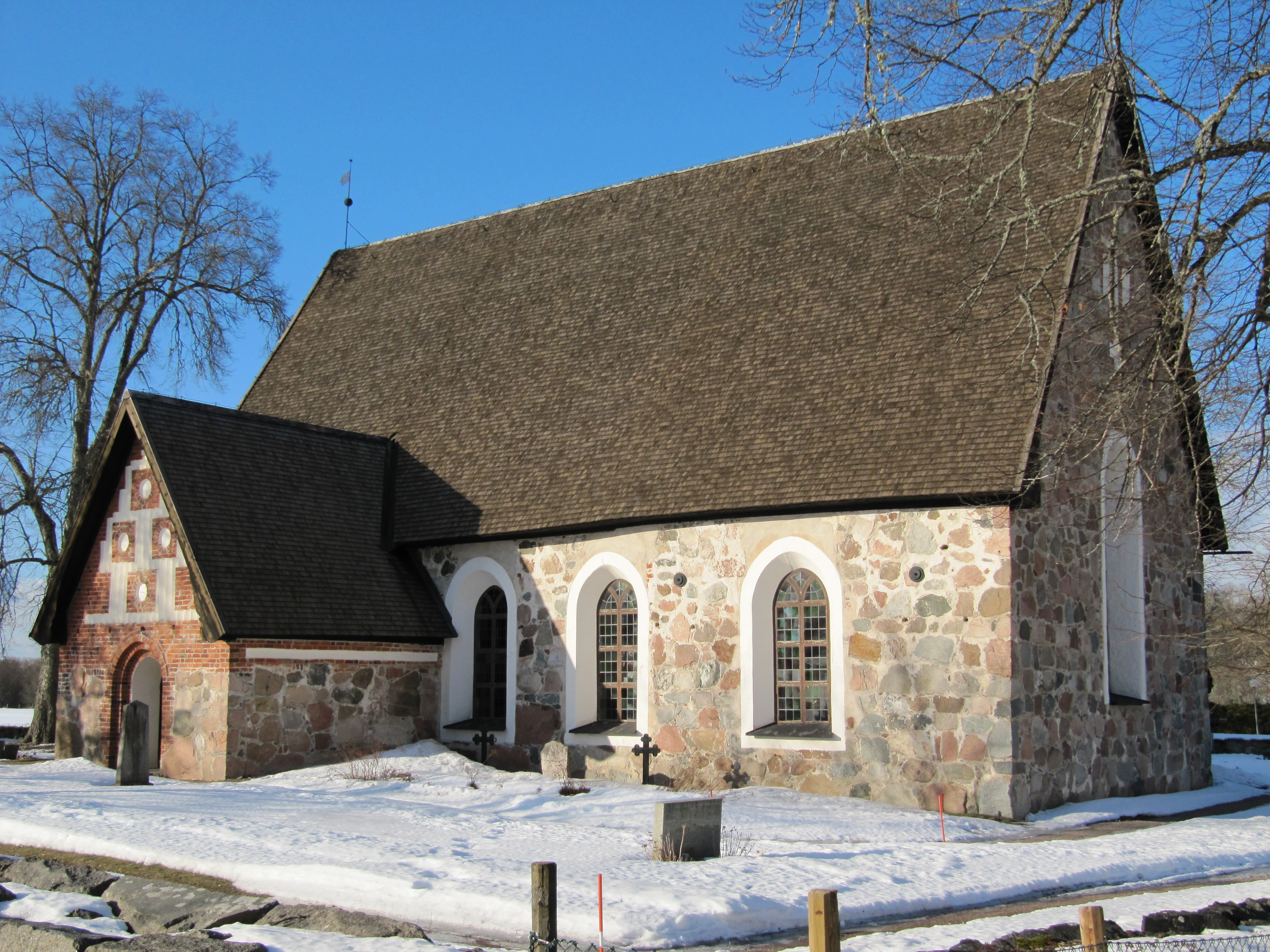 Jumkils kyrka